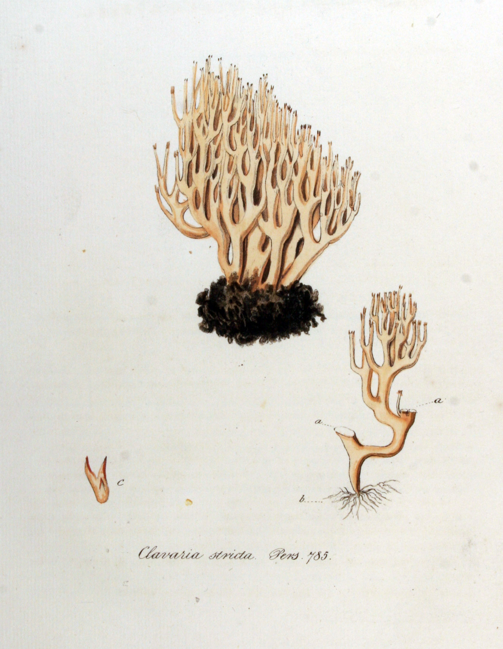 Clavaria stricta